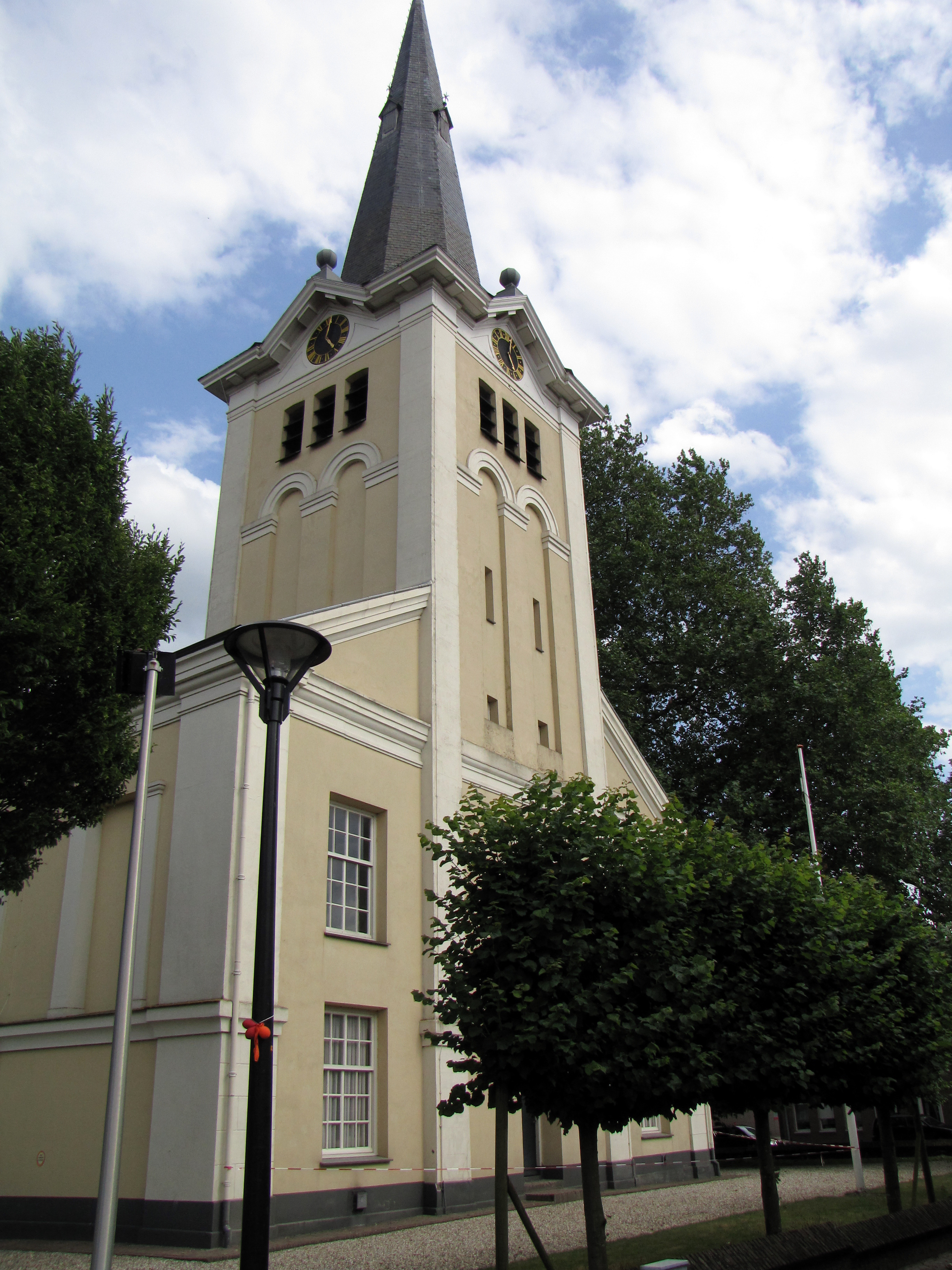 St. Maarten, NH kerk in Gendringen, Oude IJsselstreek.